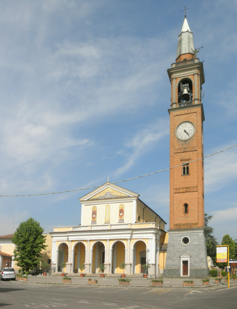 La chiesa parrocchiale dei SS. Naborre e Felice a Postino, fraz. di Dovera